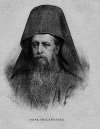 Sáva Chilandarec, mnich žijící v klášteře Chilandar